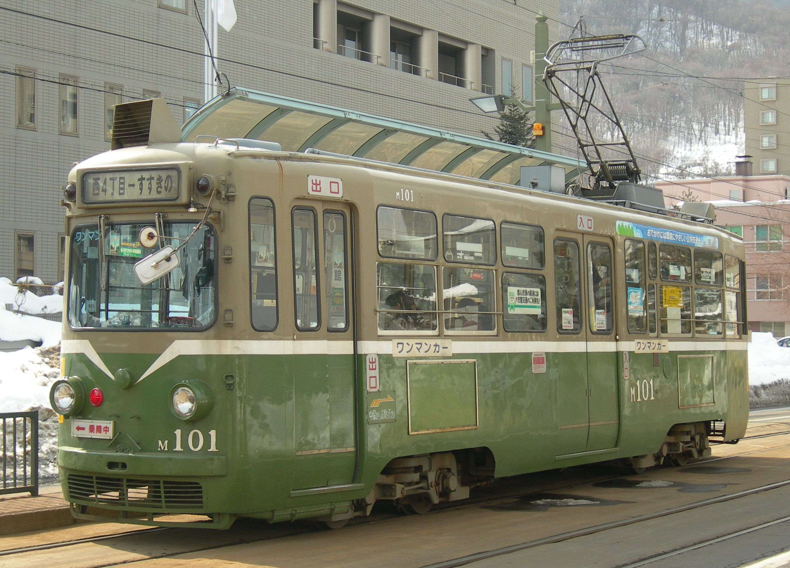 札幌市交通局M100形電車